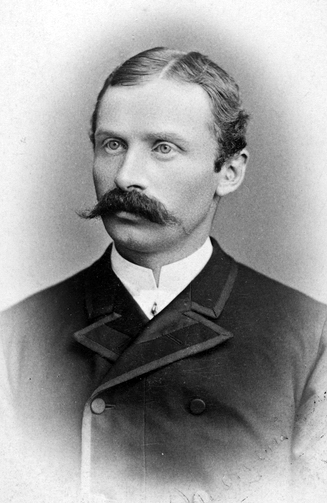 portrett, mann, generalmajor, vignettert brystbilde.